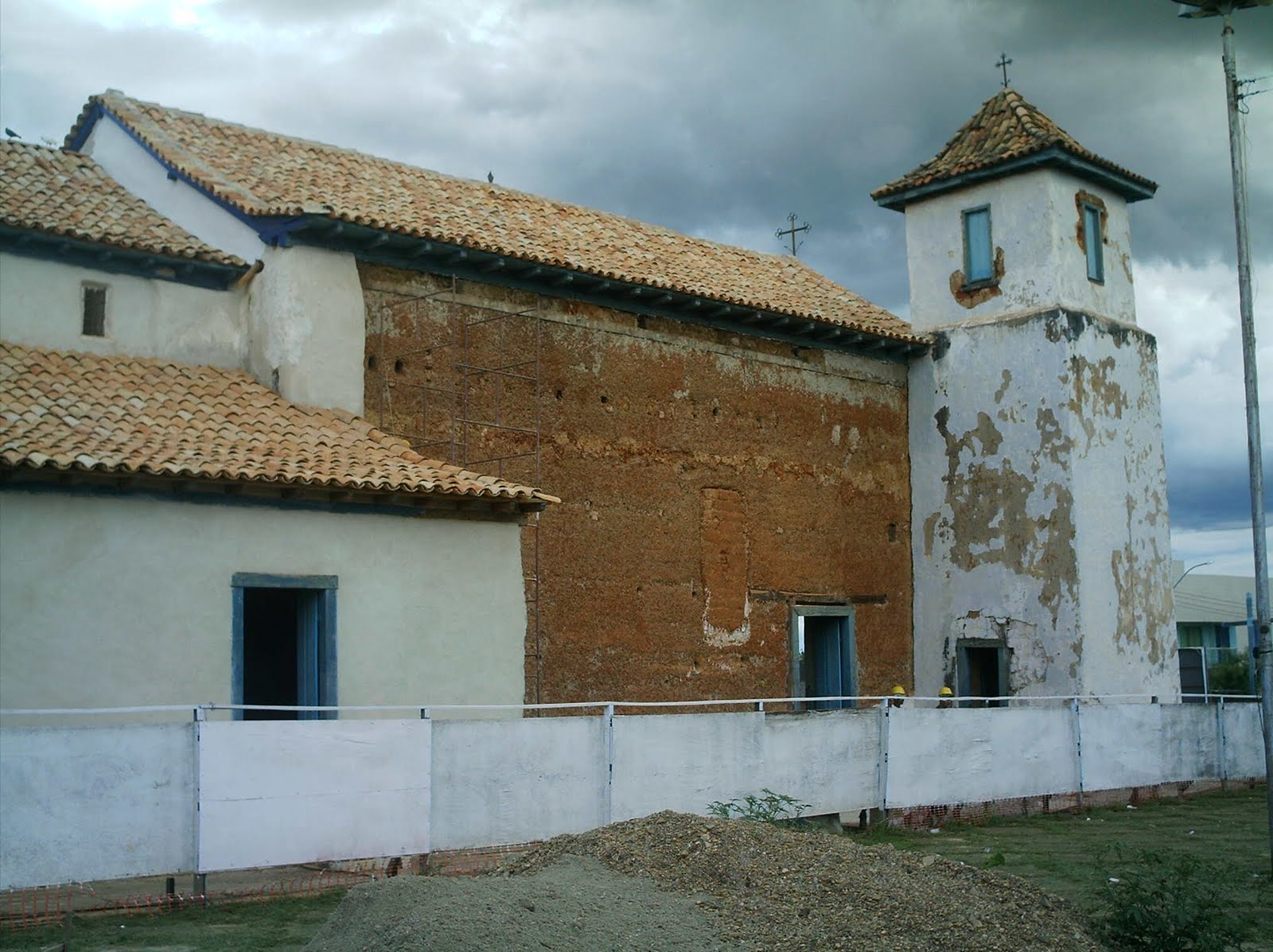 Igreja do rosário em Luziânia GO